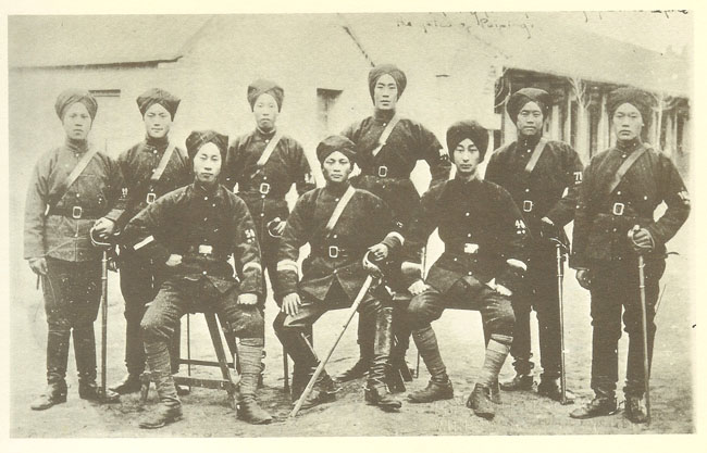 青年期の張作霖（前列中央）